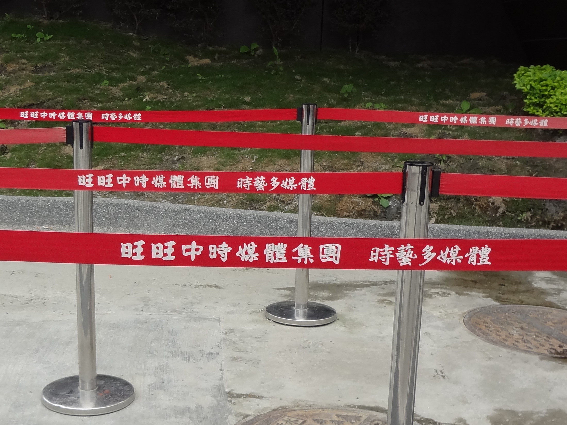 華山1914文化創意產業園區，華山顛倒屋售票處前，時藝多媒體工作人員拉起的排隊隔離線。